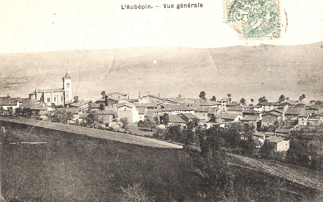 L' Aubépin - Vue générale (aujourd' hui commune de Larajasse (69)